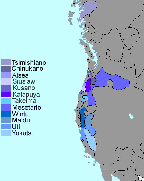 Penutian languages (USA and Canada)